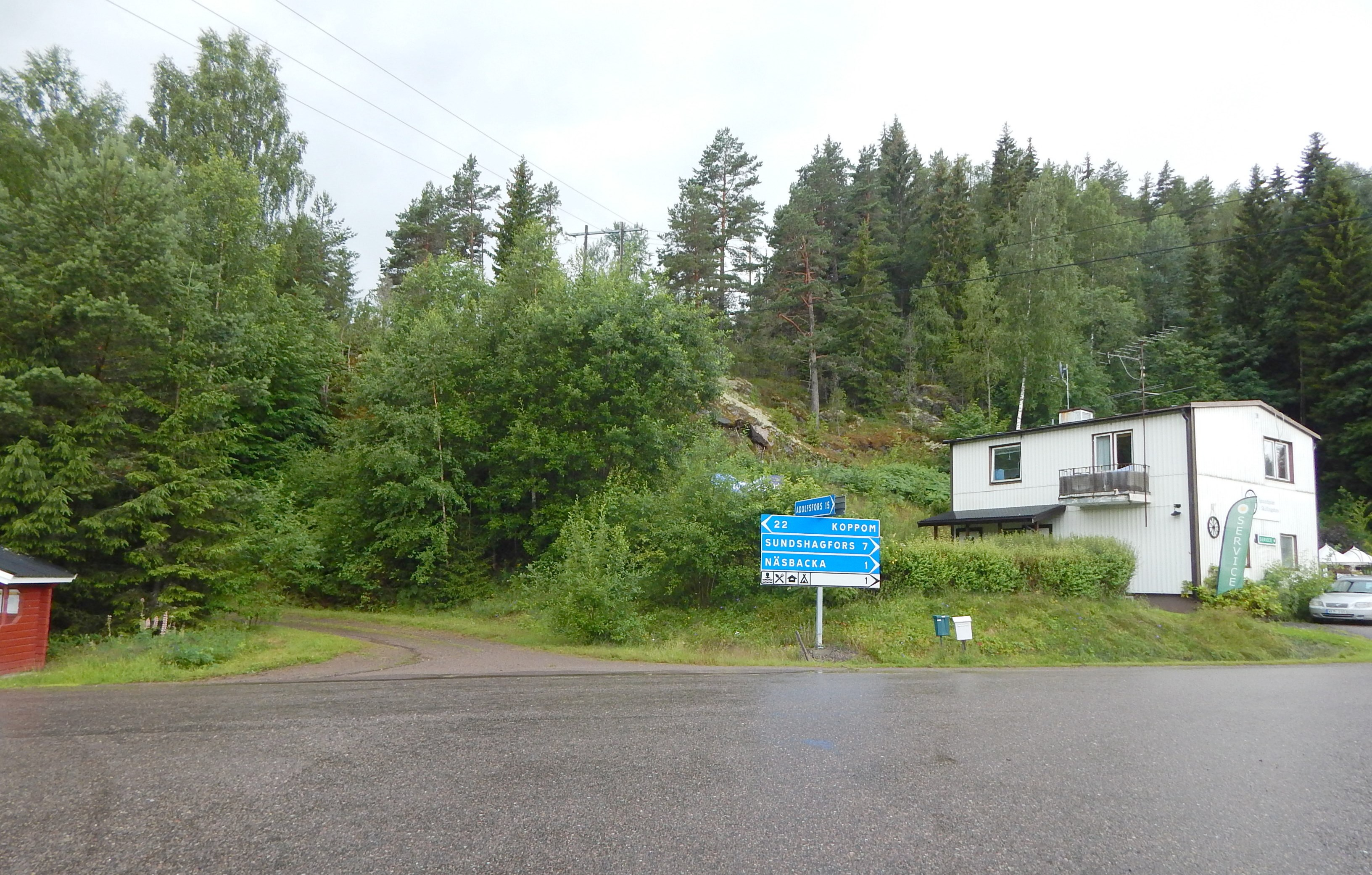 Från Skillingsfors: länsväg S622 åt vänster, S628 åt höger